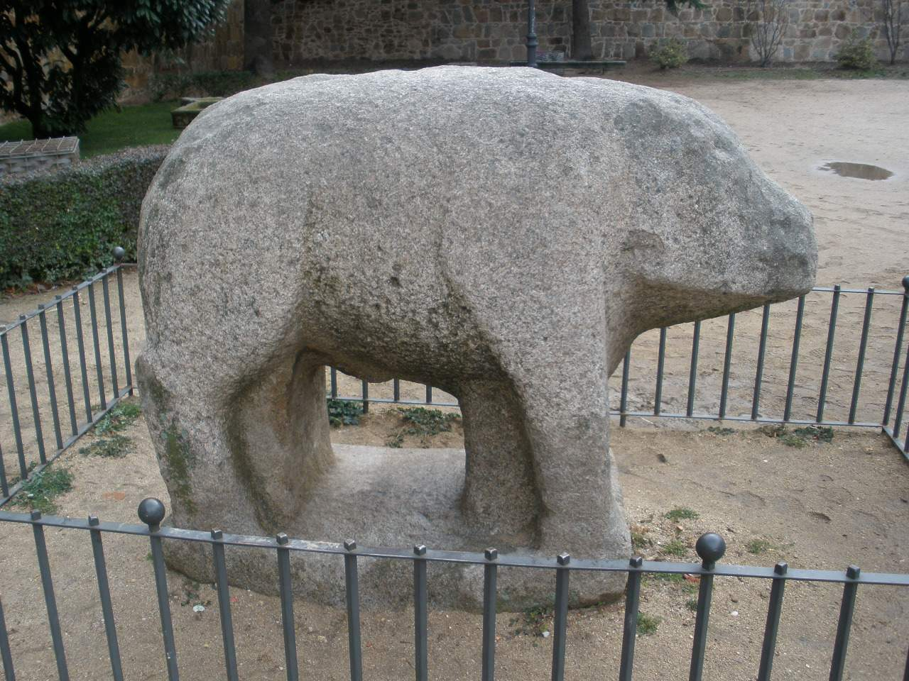 Verraco en la plaza de Calvo Sotelo, Ávila